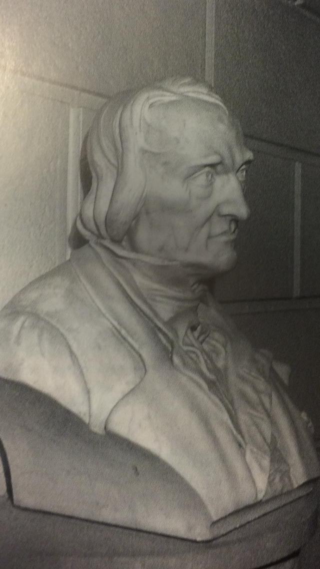 Photographie du buste de Jacquard, mairie du 4ème arrondissement de Lyon.